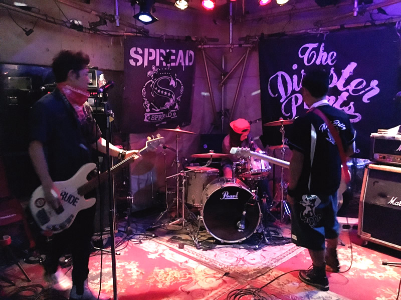 2017.12.17 SHACHI 心斎橋火影